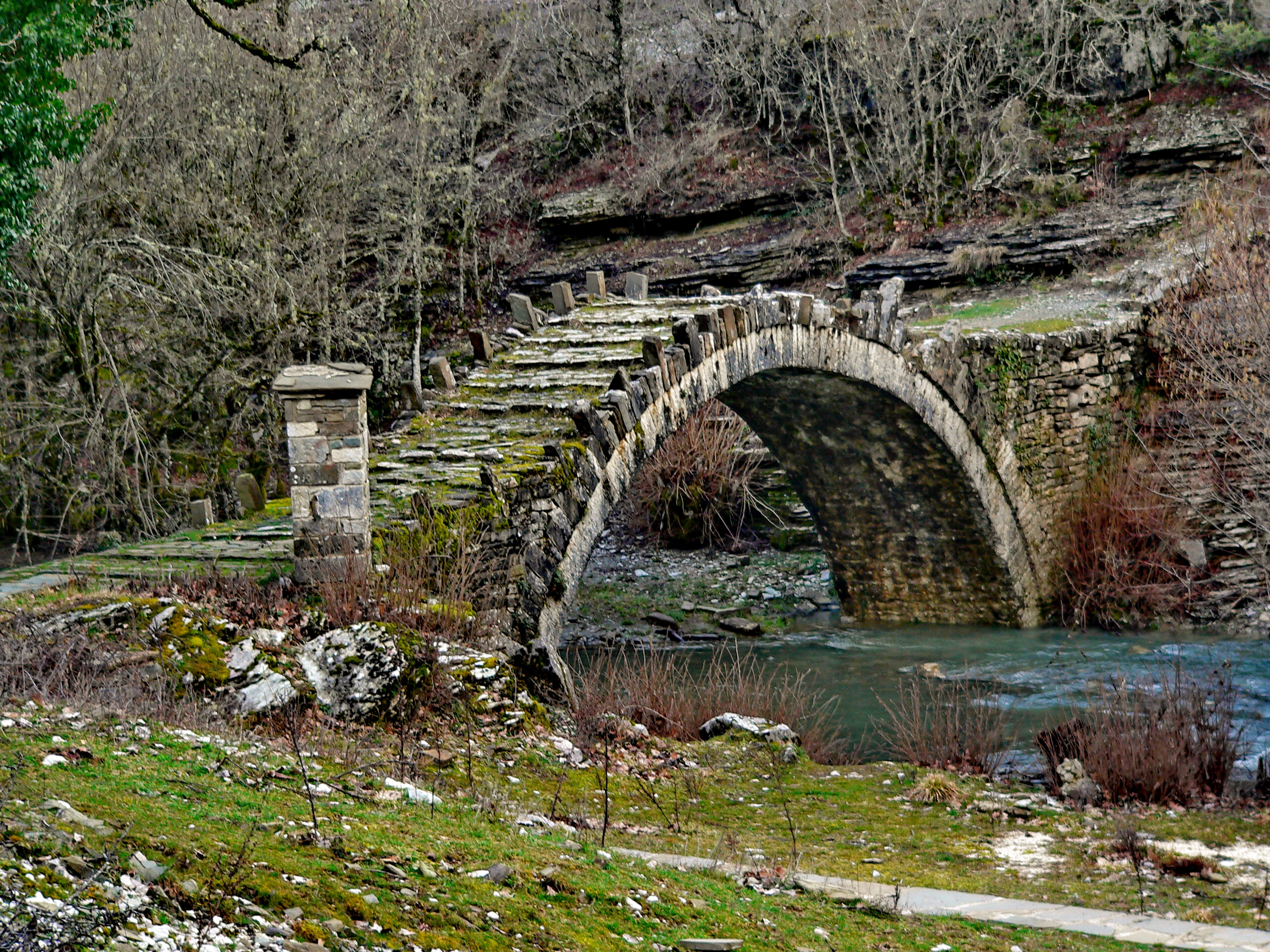 Γεφυρι καπεταν Αρκουδα This is a photography of Natura 2000 protected area with ID GR2130004